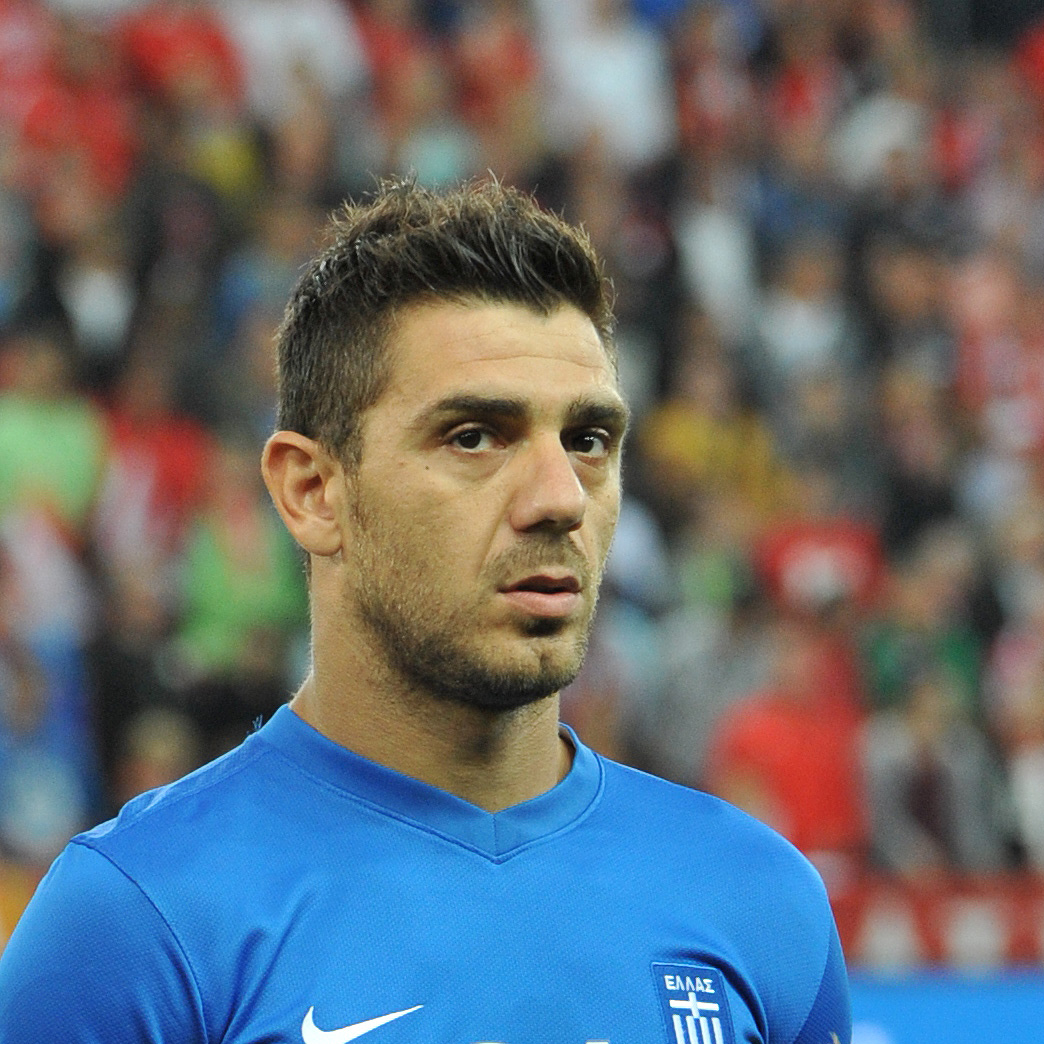 Freundschaftliches Länderspiel Österreich - Griechenland am 14. August 2013 in Salzburg: Kostas Katsouranis